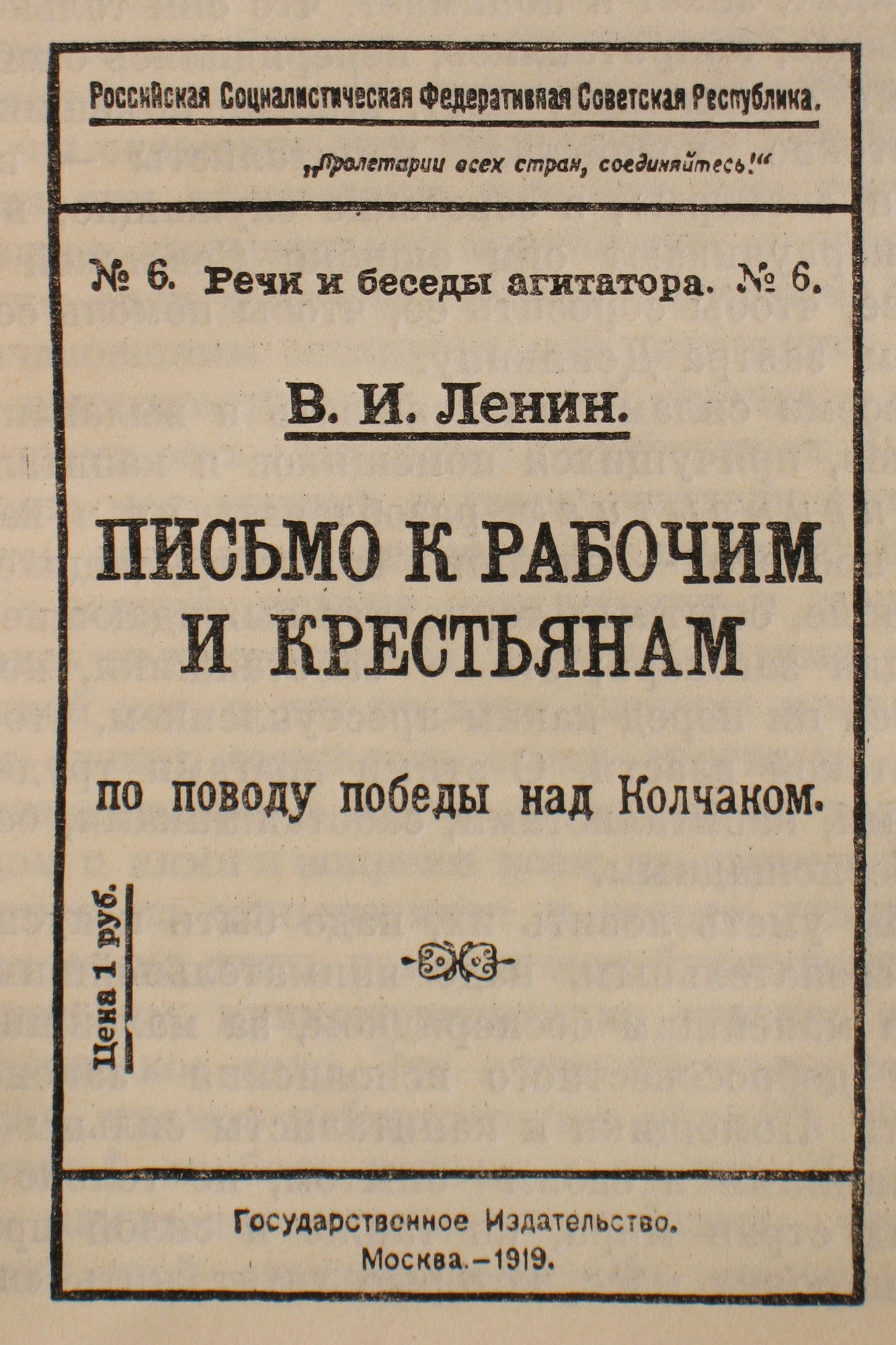 Ленин. Письмо к рабочим и крестьянам по поводу победы над Колчаком. Москва, ГИЗ, 1919, серия "Речи и беседы агитатора" № 6.